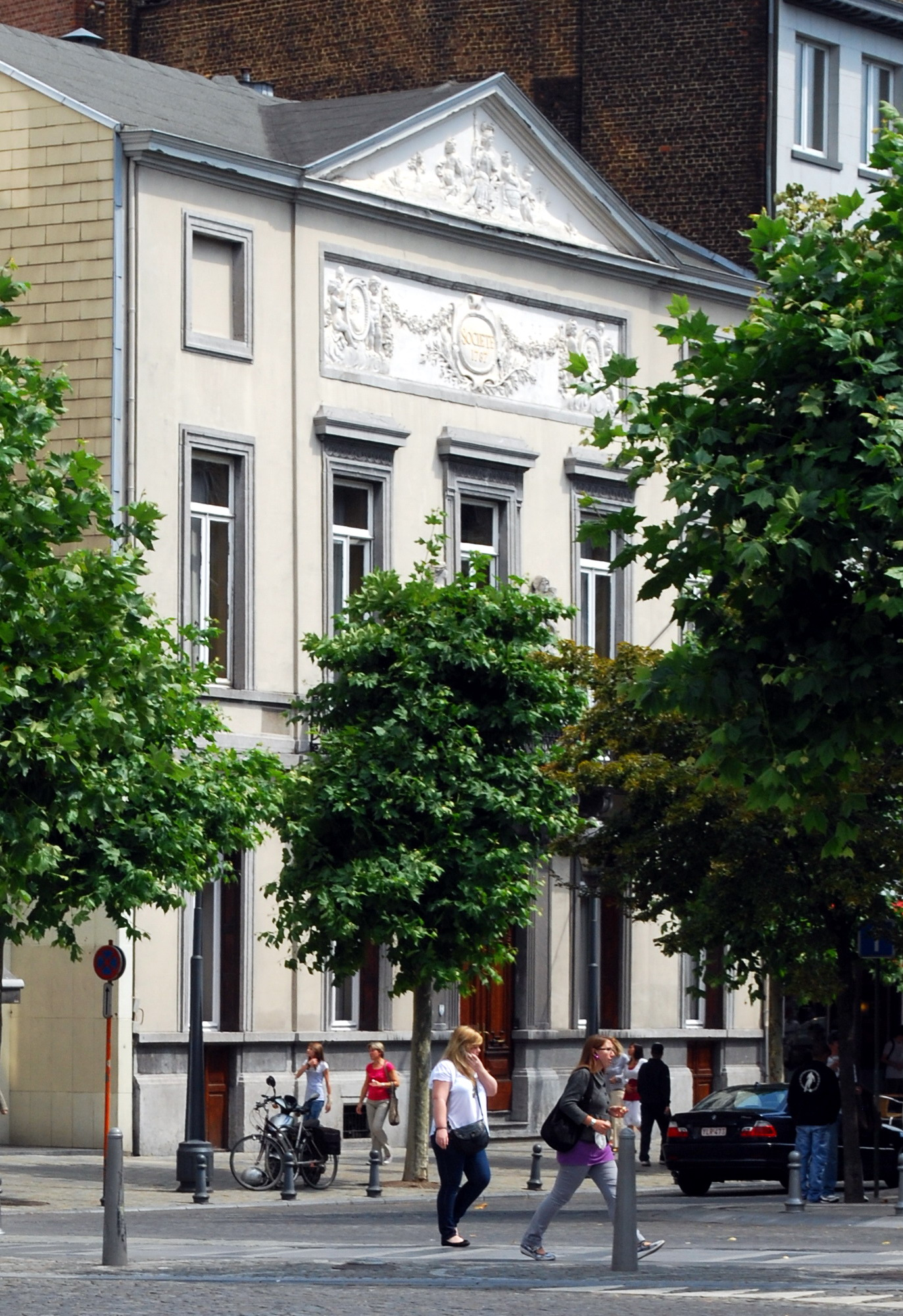 La maison de la Société Littéraire de Liège, sur la place de la République Française : cabinet de lecture fondé le 5 avril 1779 sous le règne et l'égide du prince-évêque de Liège François-Charles de Velbrück, le bâtiment a fait l'objet d'une importante restauration achevée en 2012.